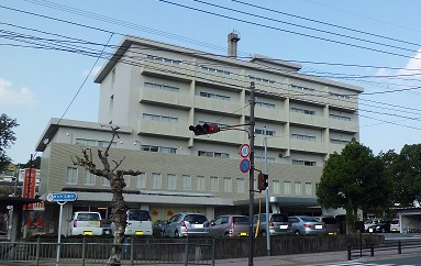 Katolické centrum v Nagasaki, Japonsko